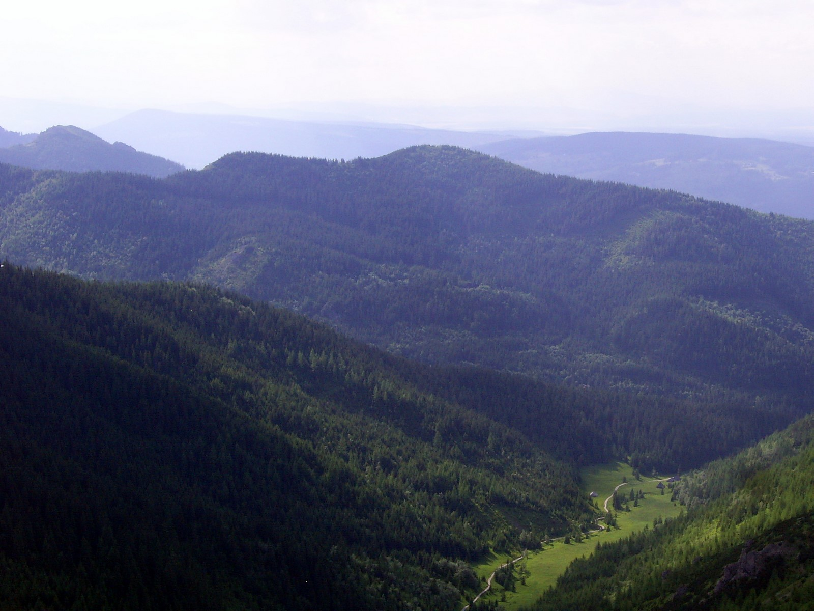 Krokiew ze szlaku Doliną Jaworzynki na Przełęcz między Kopami